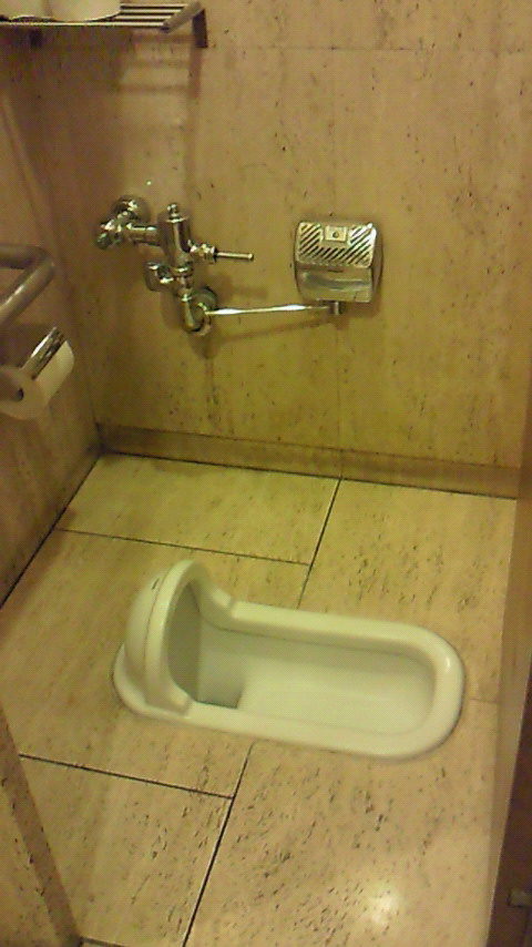 サニタイザーが取り付けられた大便器